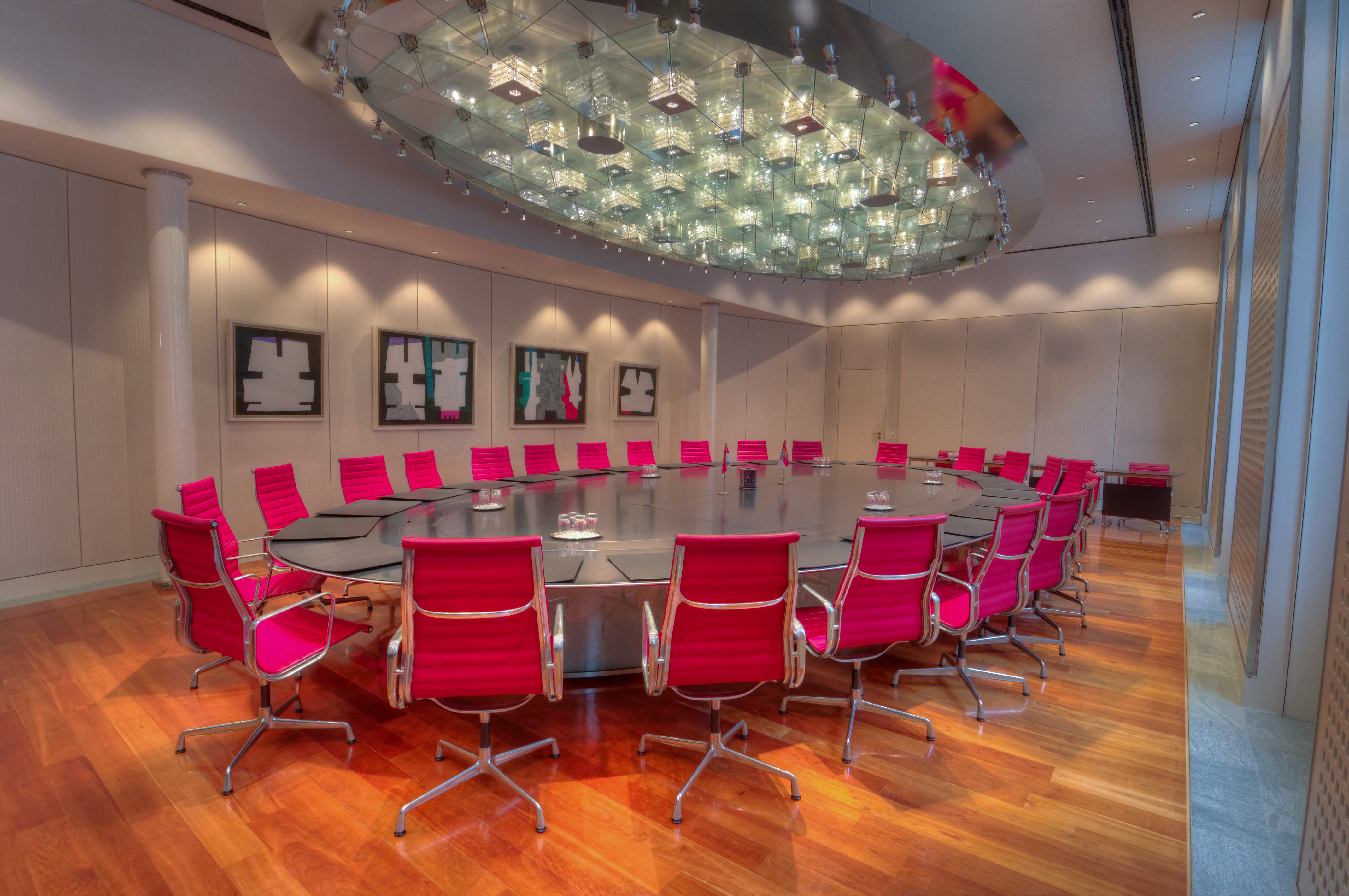 Landtagsprojekt Hessen